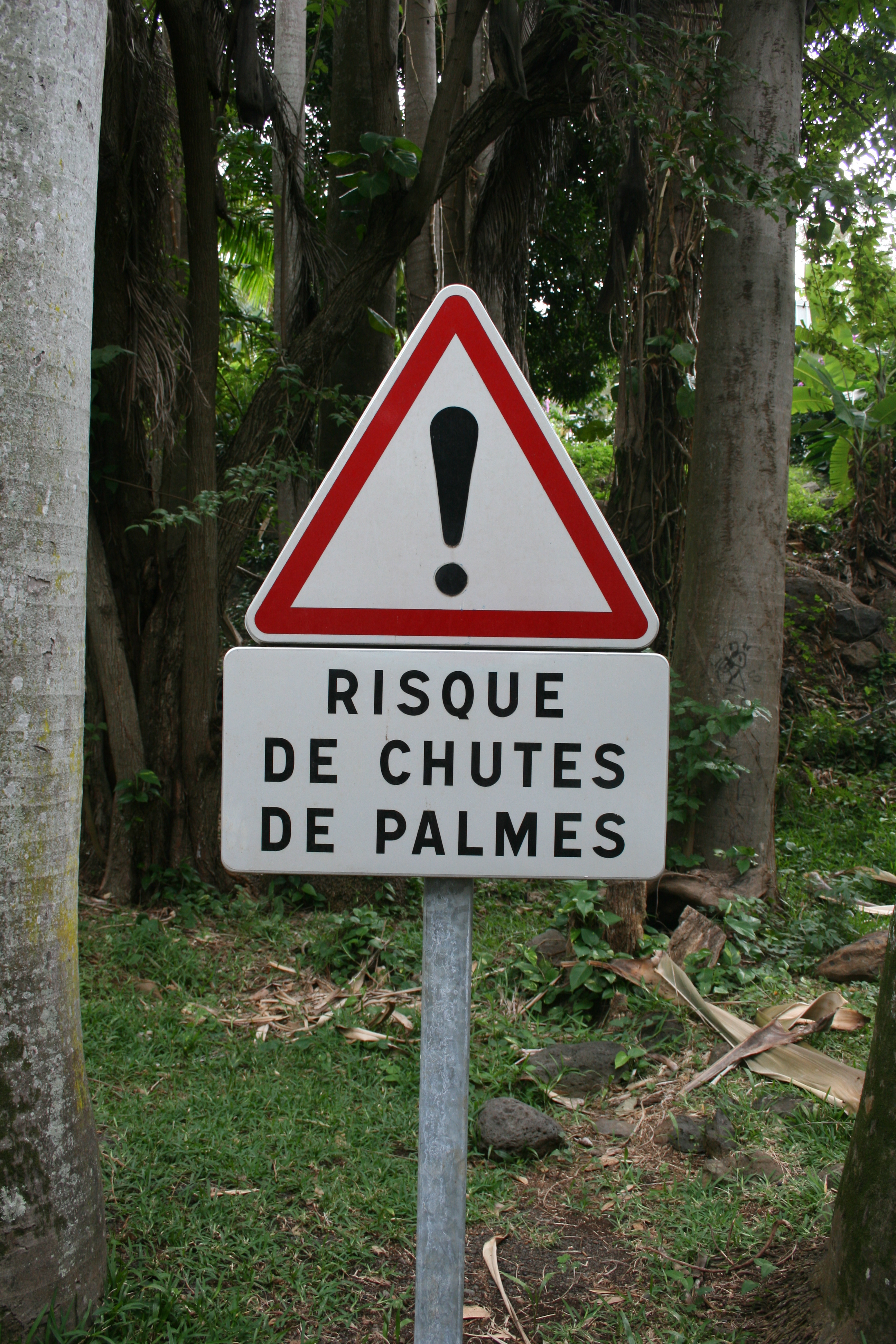 Panneau signalant un risque de chute de palmes à Saint-Denis de la Réunion.